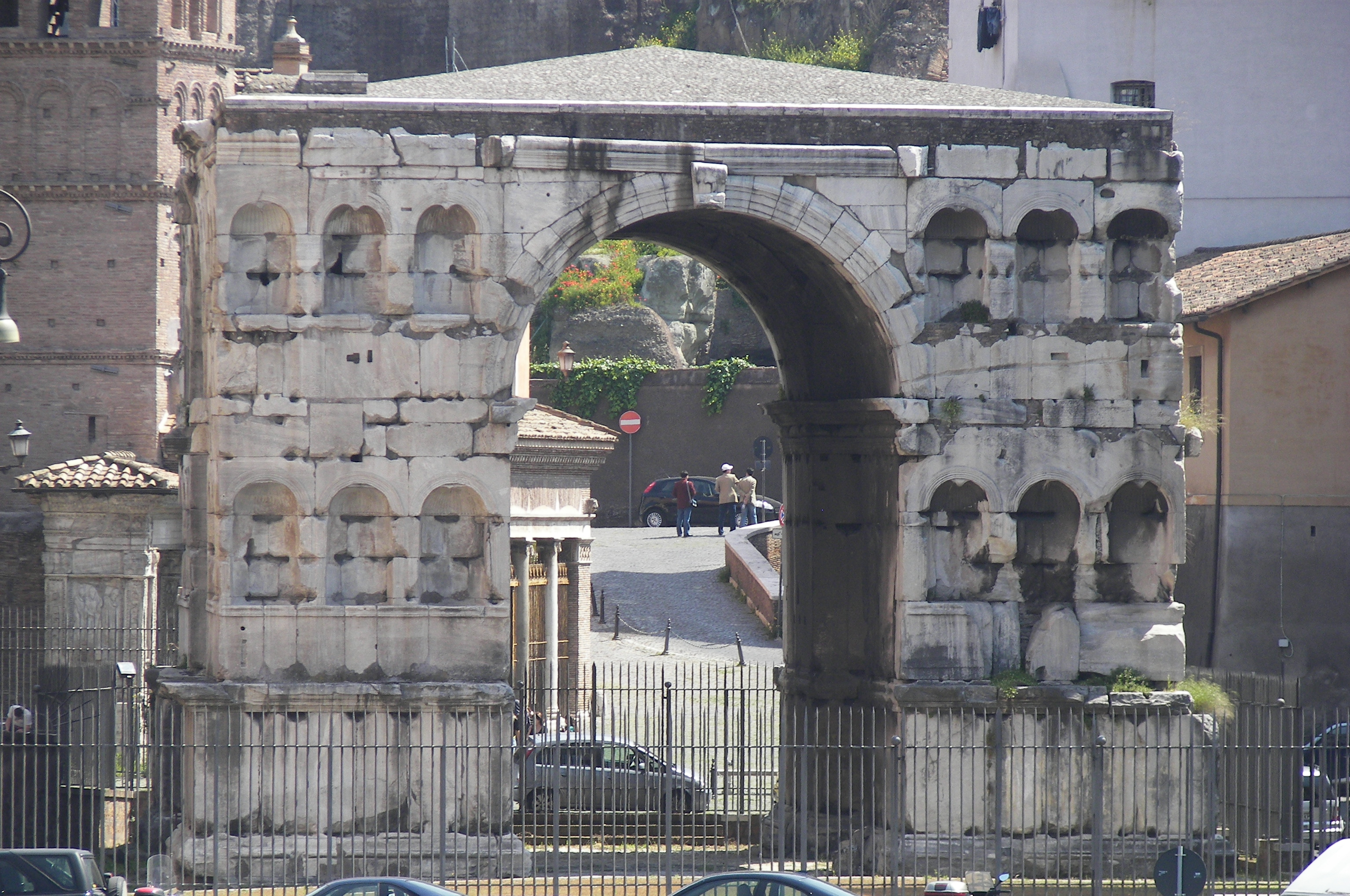 Arco di Giano in Rome.